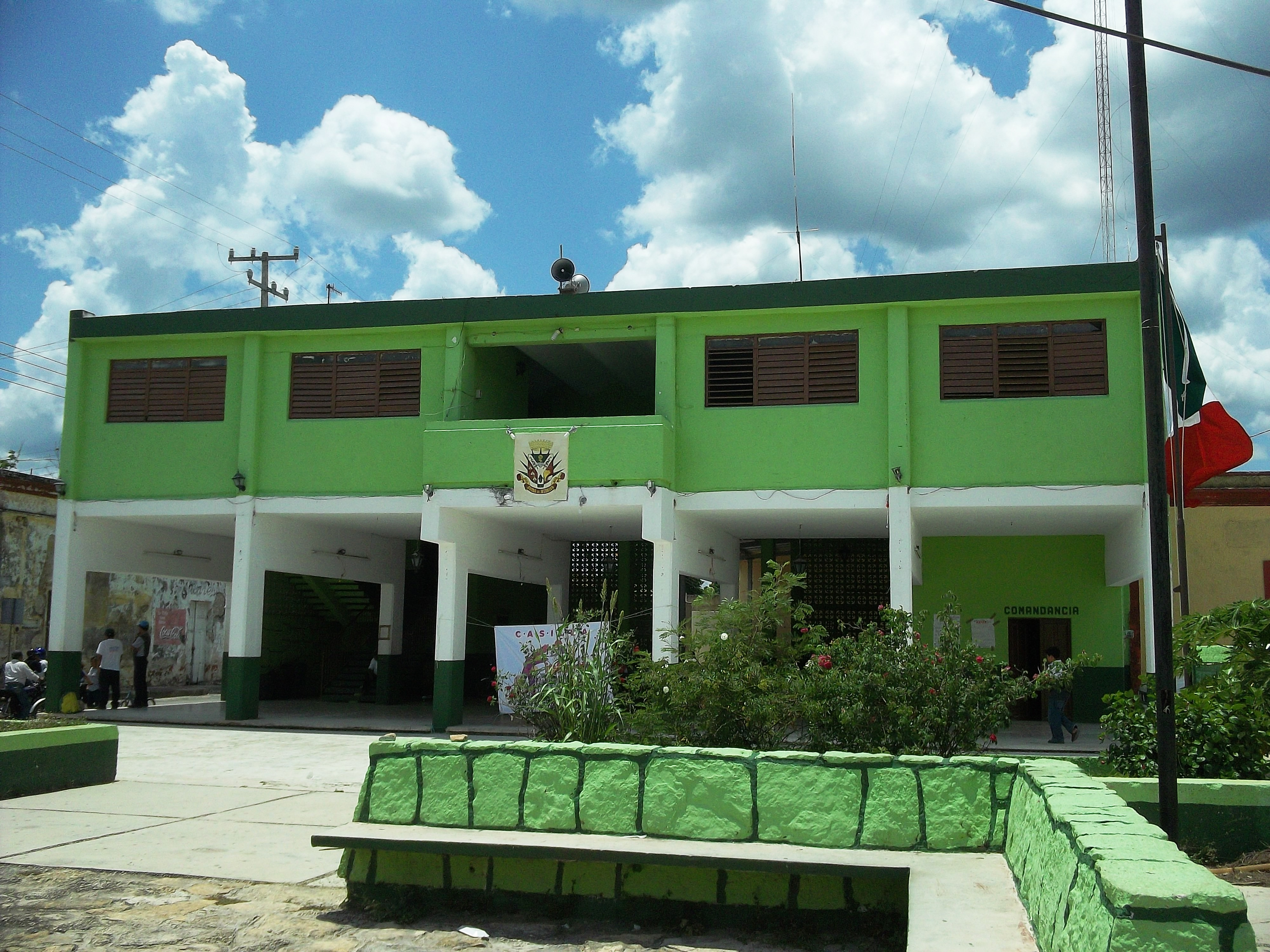 Palacio municpal de Suma de Hidalgo, Yucatán.